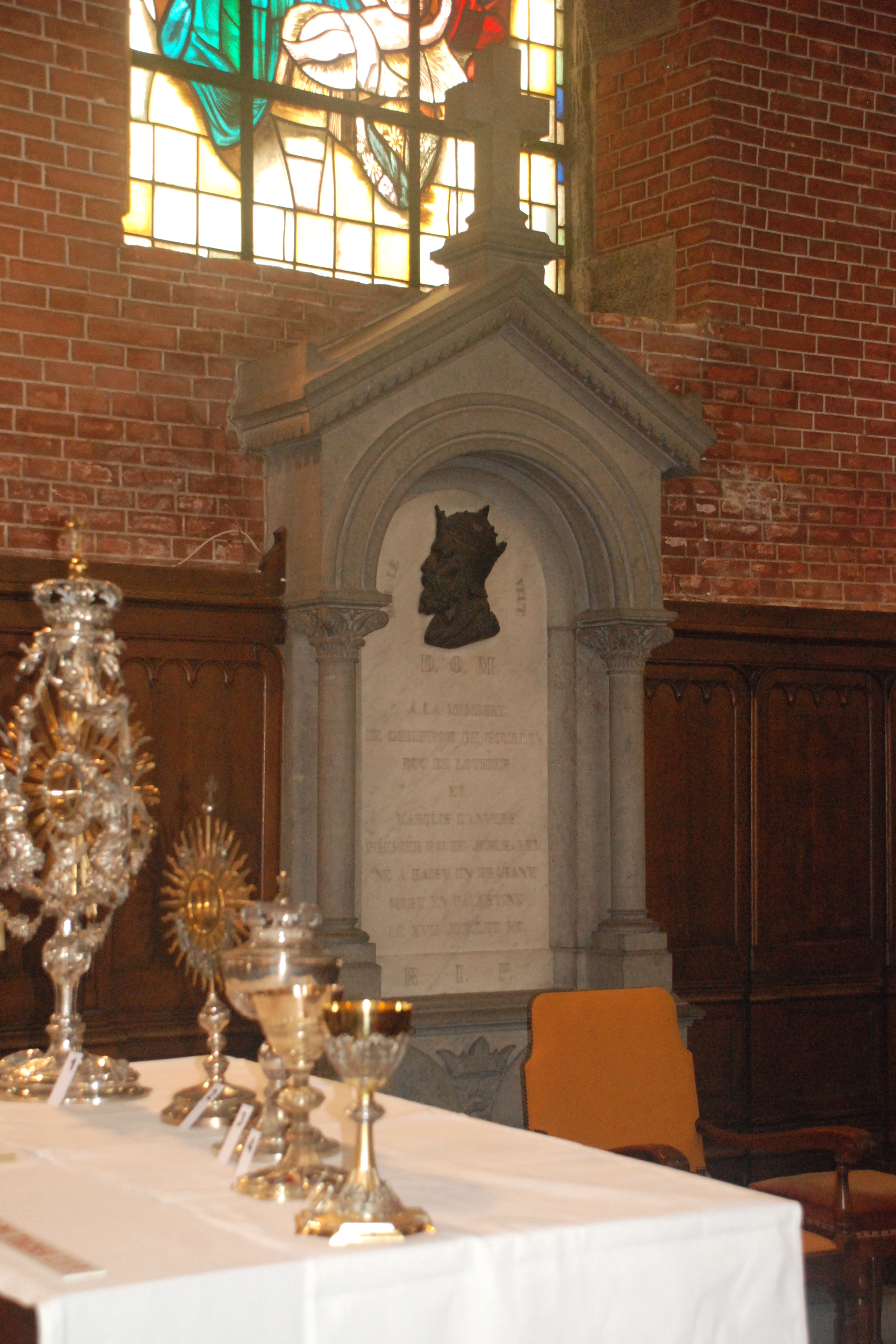 Belgique - Brabant wallon - Genappe - Baisy-Thy - Église Saint-Hubert - Stèle à Godefroid de Bouillon